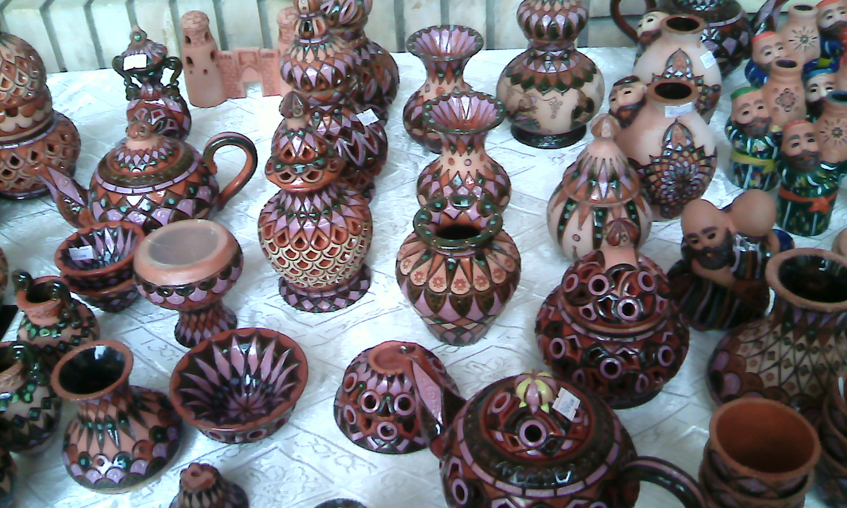 Глиняные игрушки ремесленников Таджикистана на выставке-ярмарке ремесленников, 2015 год